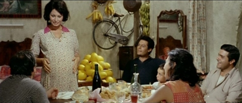 Képkocka a „Tegnap, ma, holnap” című filmből